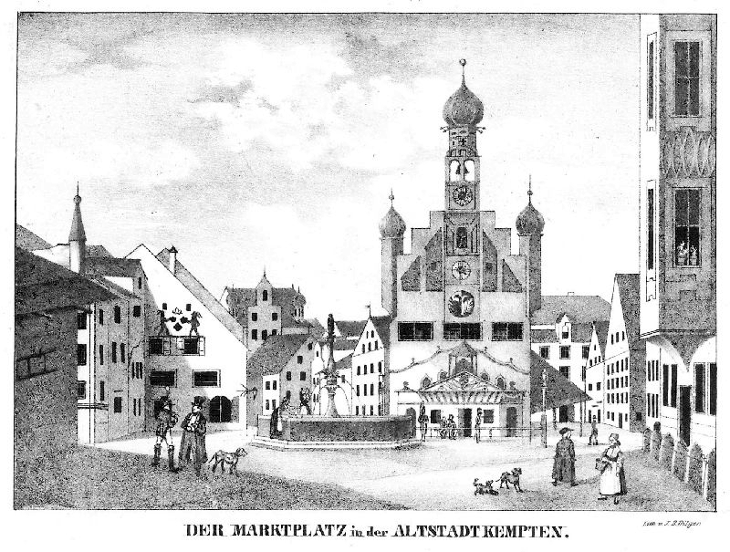 Die Lithographie von J.B. Dilger zeigt den Marktplatz mit Rathaus im Jahr 1840